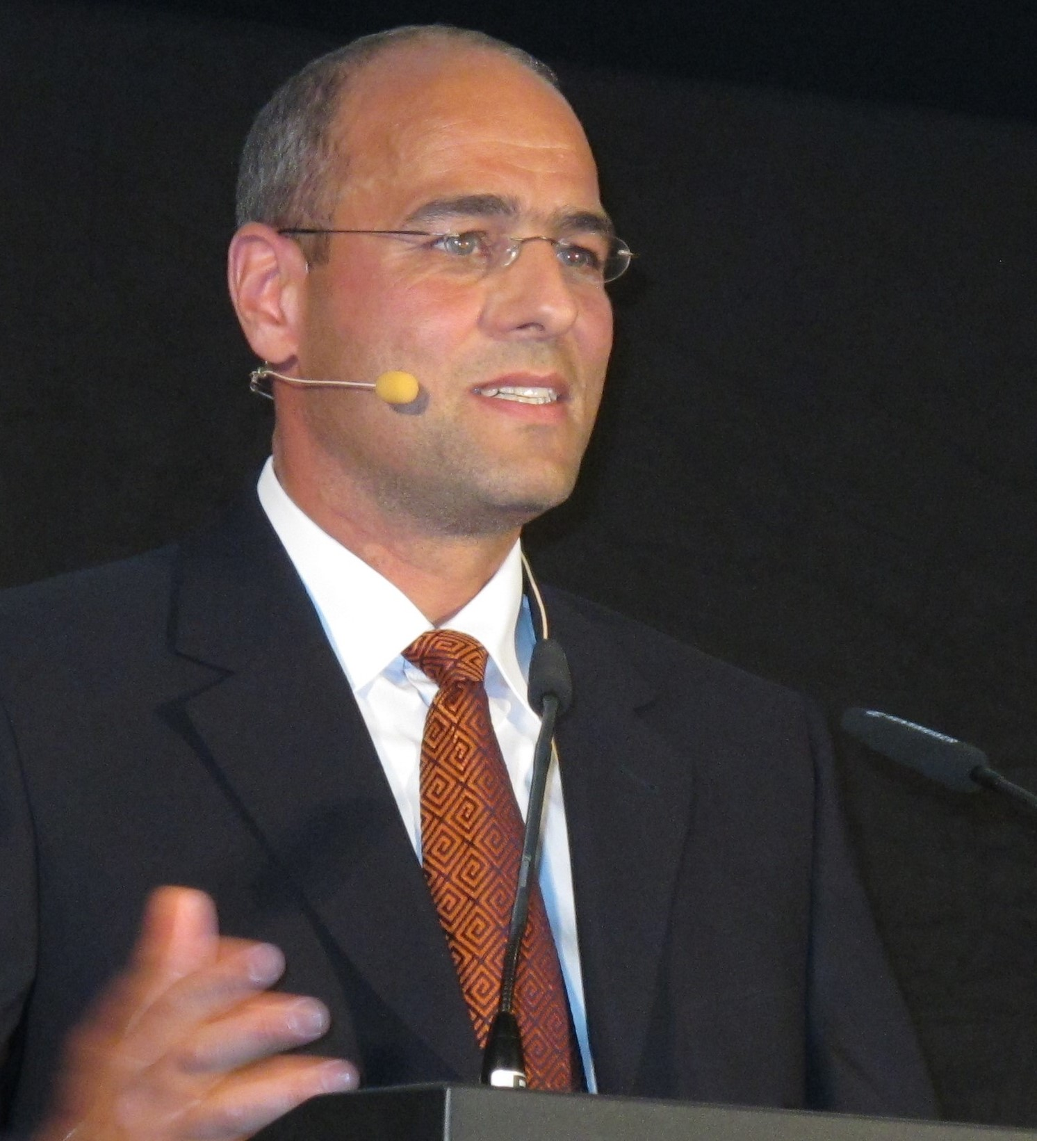 Peter Boehringer, 2014, Vortrag im Rahmen der internationalen Edelmetall- und Rohstoffmesse zu München